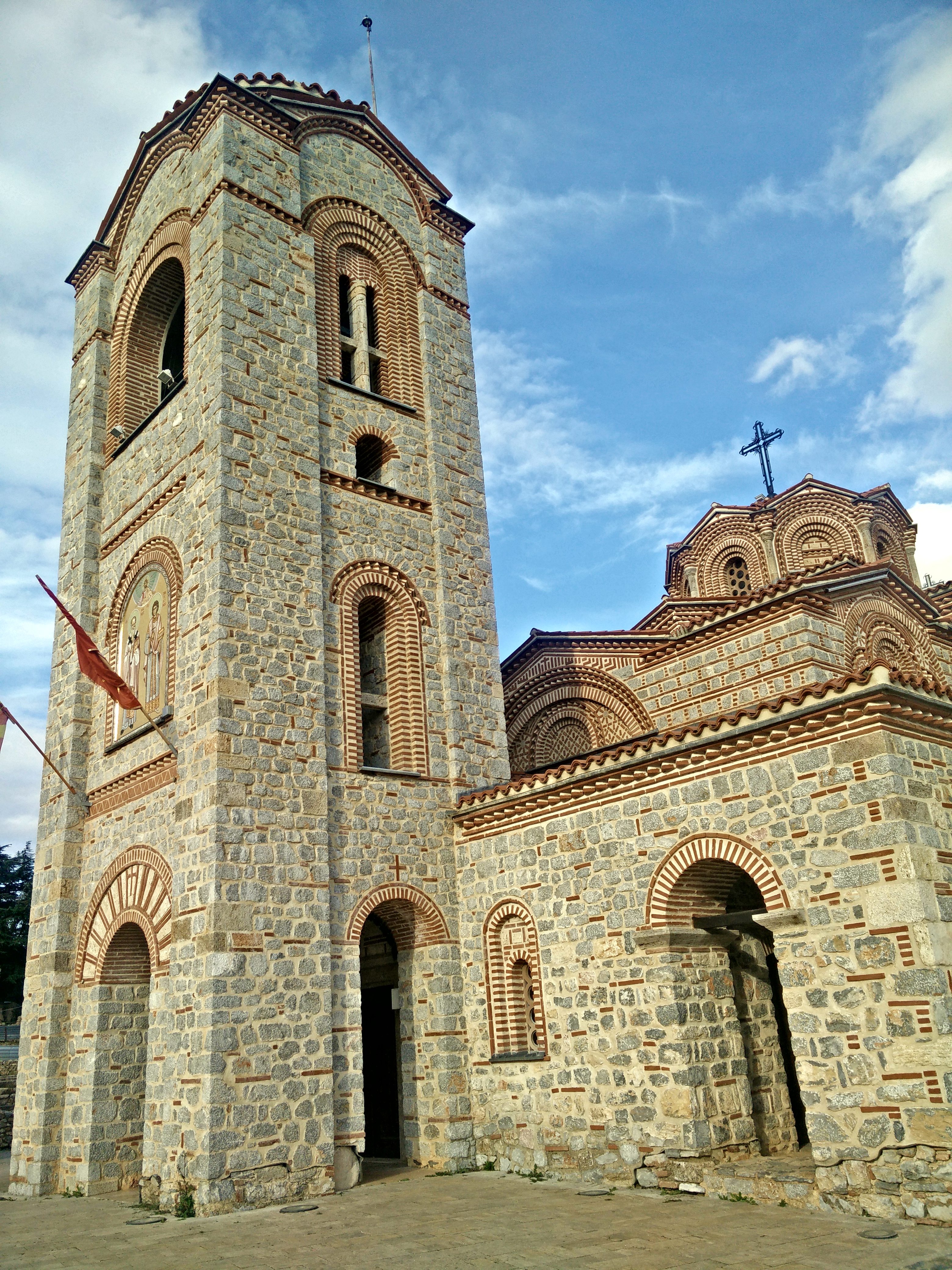 Св Пантелејмон Плаошник - Охрид, Р. Македонија